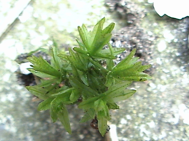 Wellenblättriges Katharinenmoos (Atrichum undulatum)